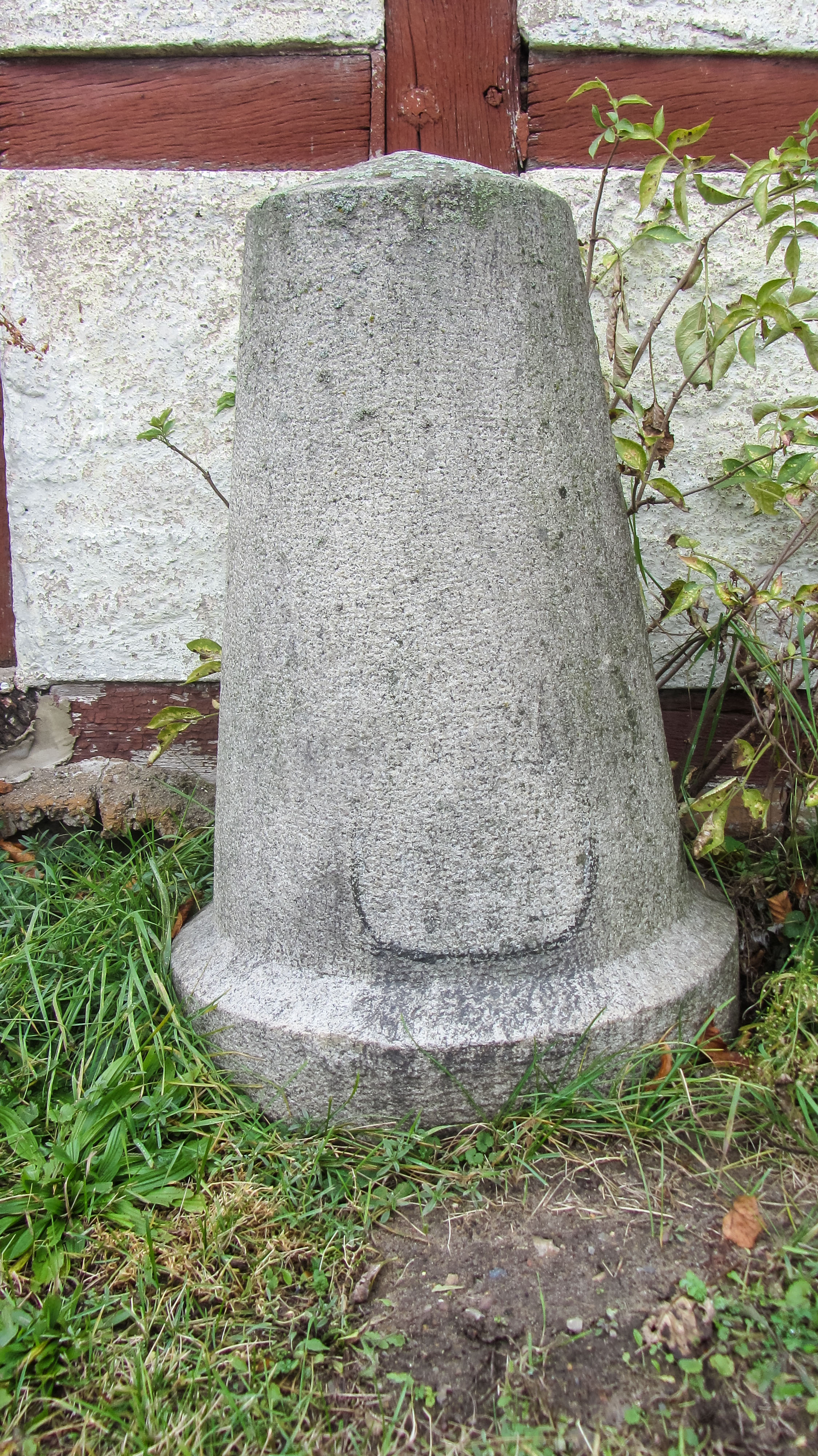 Preußischer Rundsockelstein (1702) in Schwarzholz, an der K 1065 vor einem Fachwerkhaus